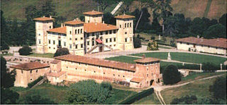 Foto della Tenuta di Camugliano